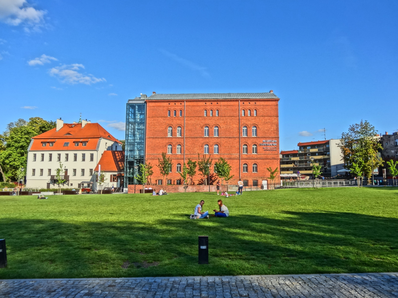 Łąka rekreacyjna na Wyspie Młyńskiej w Bydgoszczy. W tle Czerwony Spichlerz.